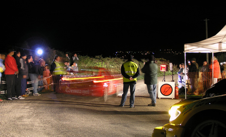 Championnat de France des Rallyes 2005 - Epreuve finale en Balagne